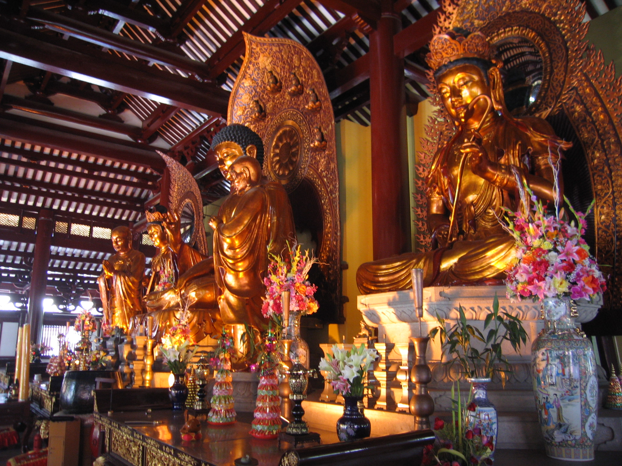 Statues in Guangxiao Temple, Guangzhou.